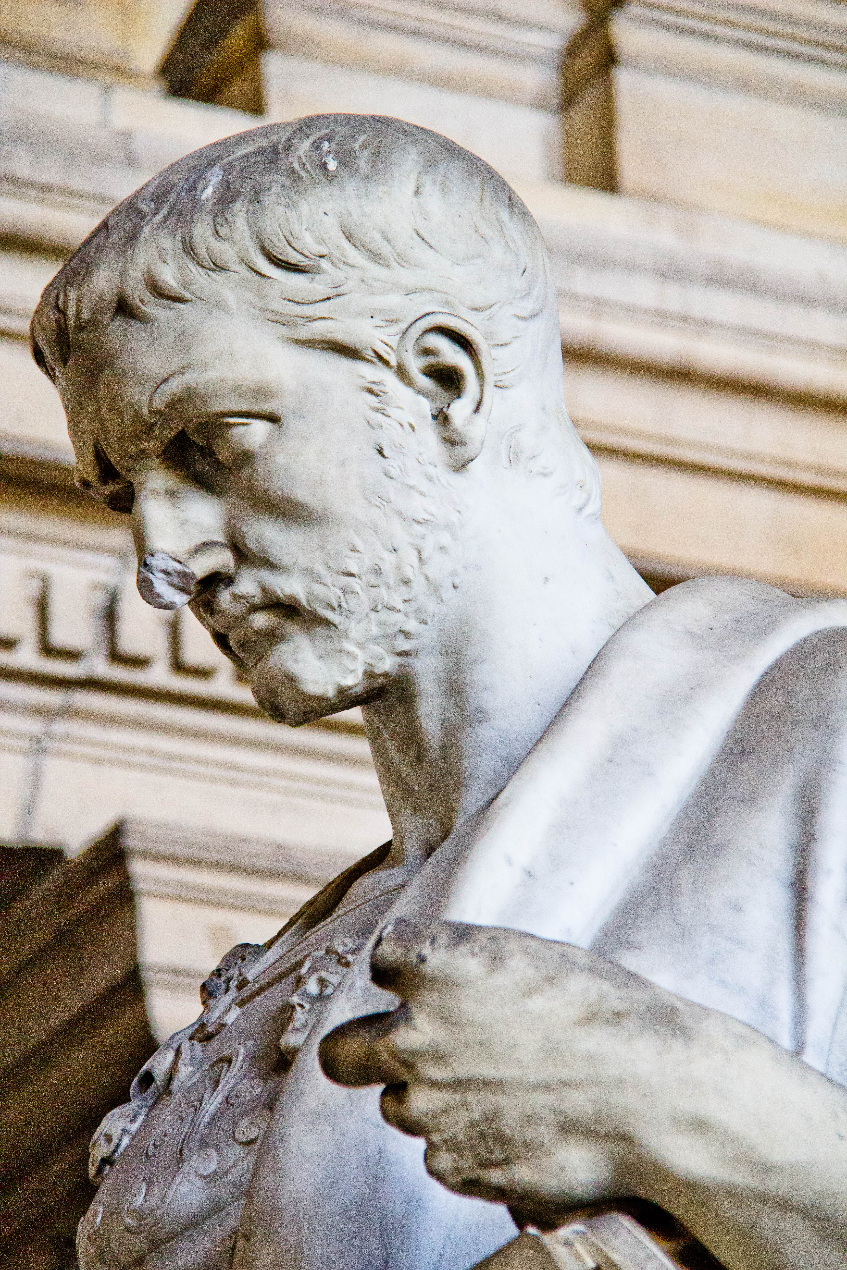 Statue de Ulpien, Palais de justice de Bruxelles